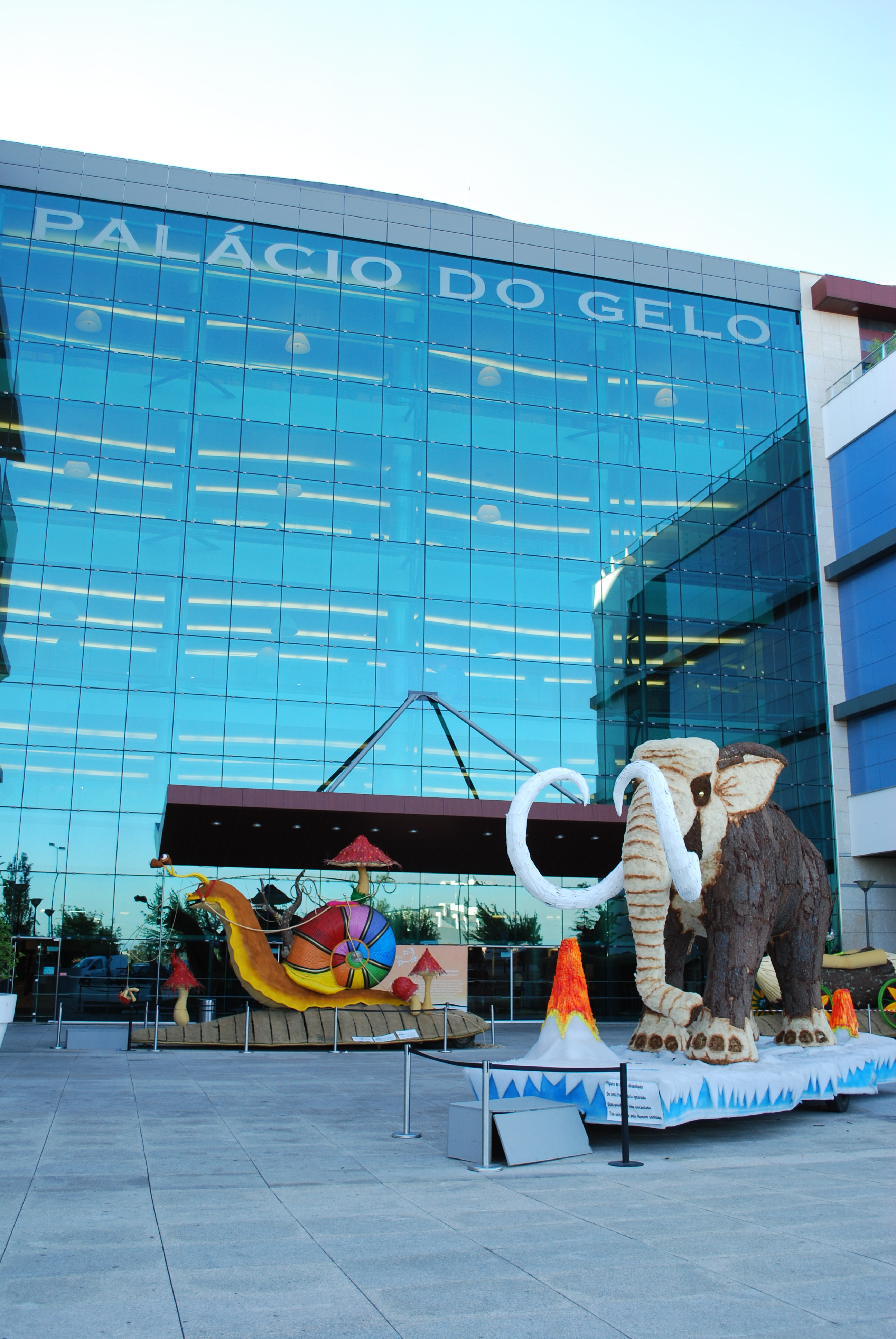 Façade principale du Palácio do Gelo Shopping à Viseu, avec des chars des Cavalhadas de Vildemoinhos 2010 exposés